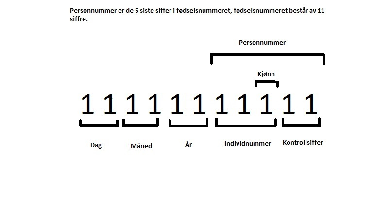 Personnummer